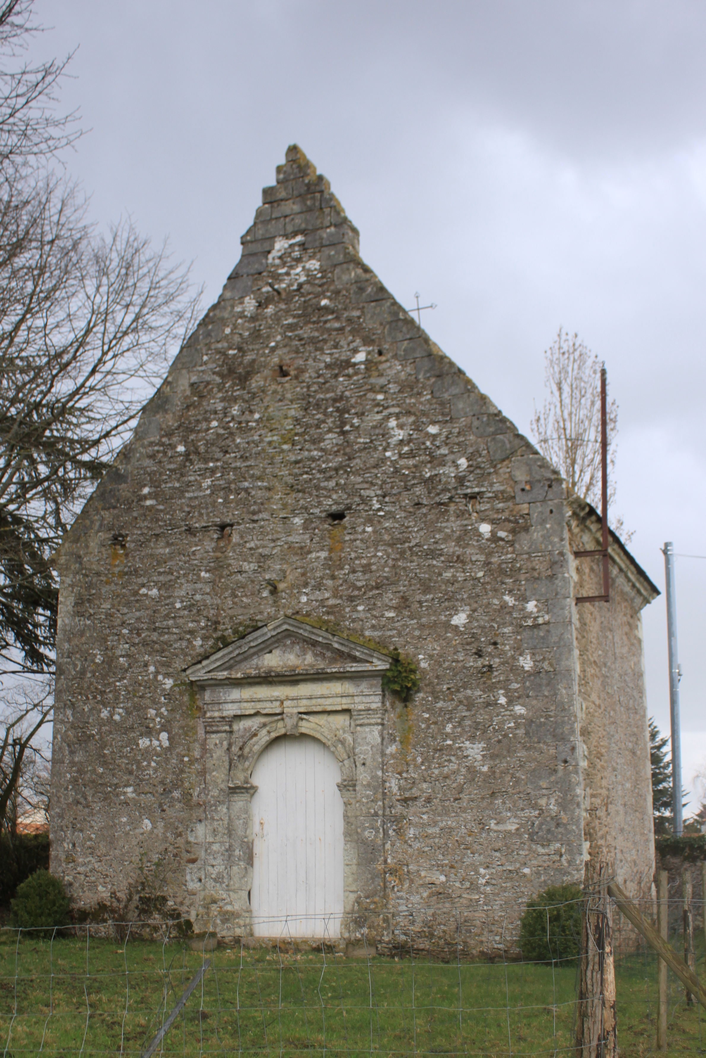 Chapelle de la Gentilhommière de la Meslerie, 1701. Fr-44-Saint-Julien-de-Concelles.